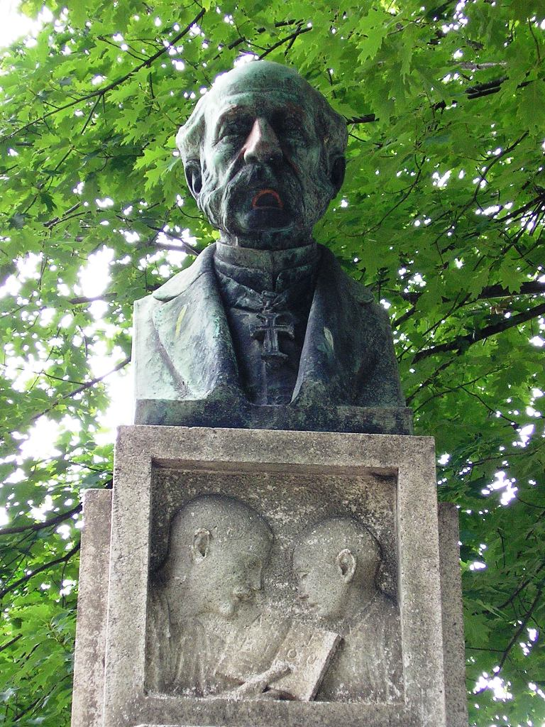 Statue of Diogo Cassels in Vila Nova de Gaia, Portugal